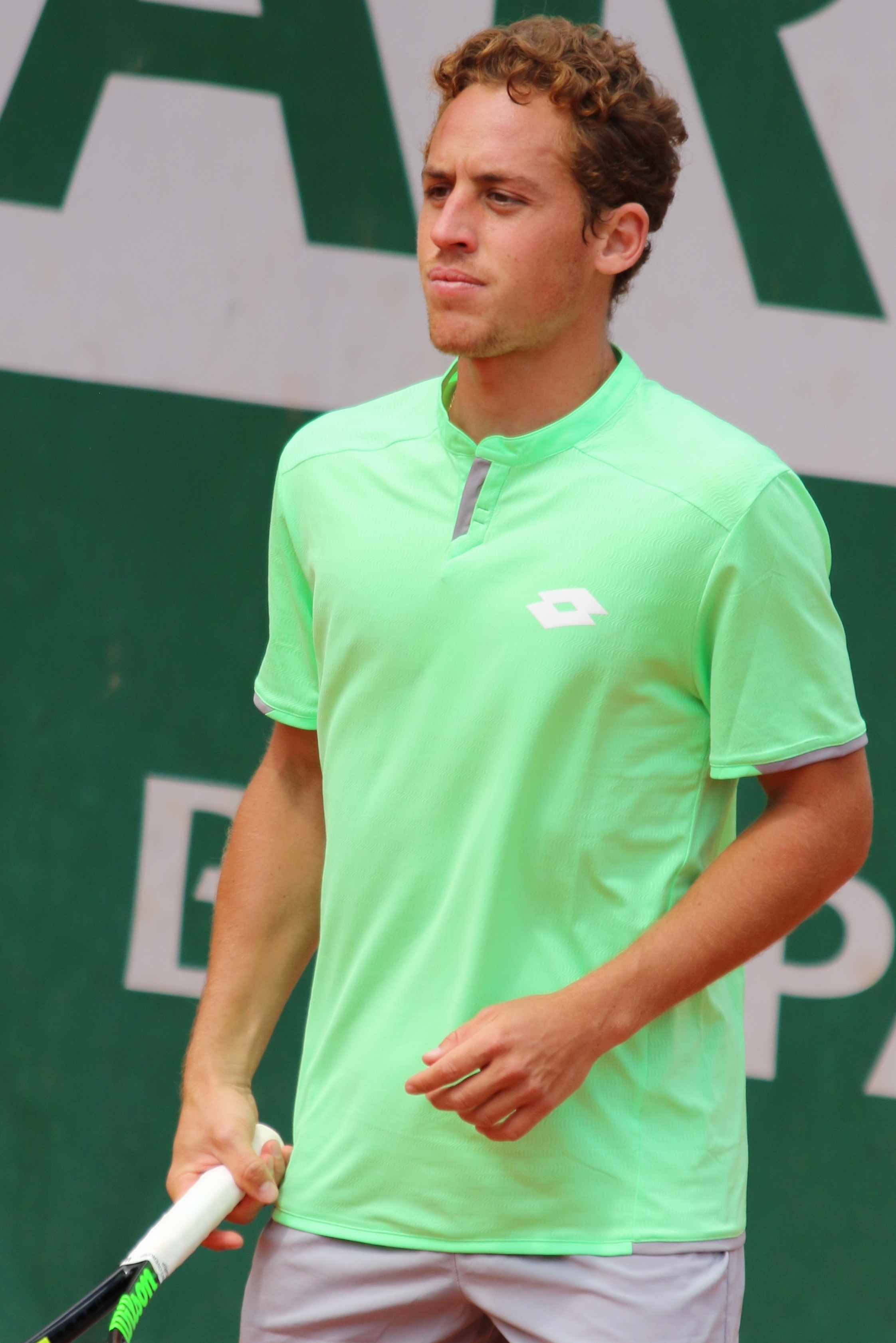 Carballes Baena RG19 (2)